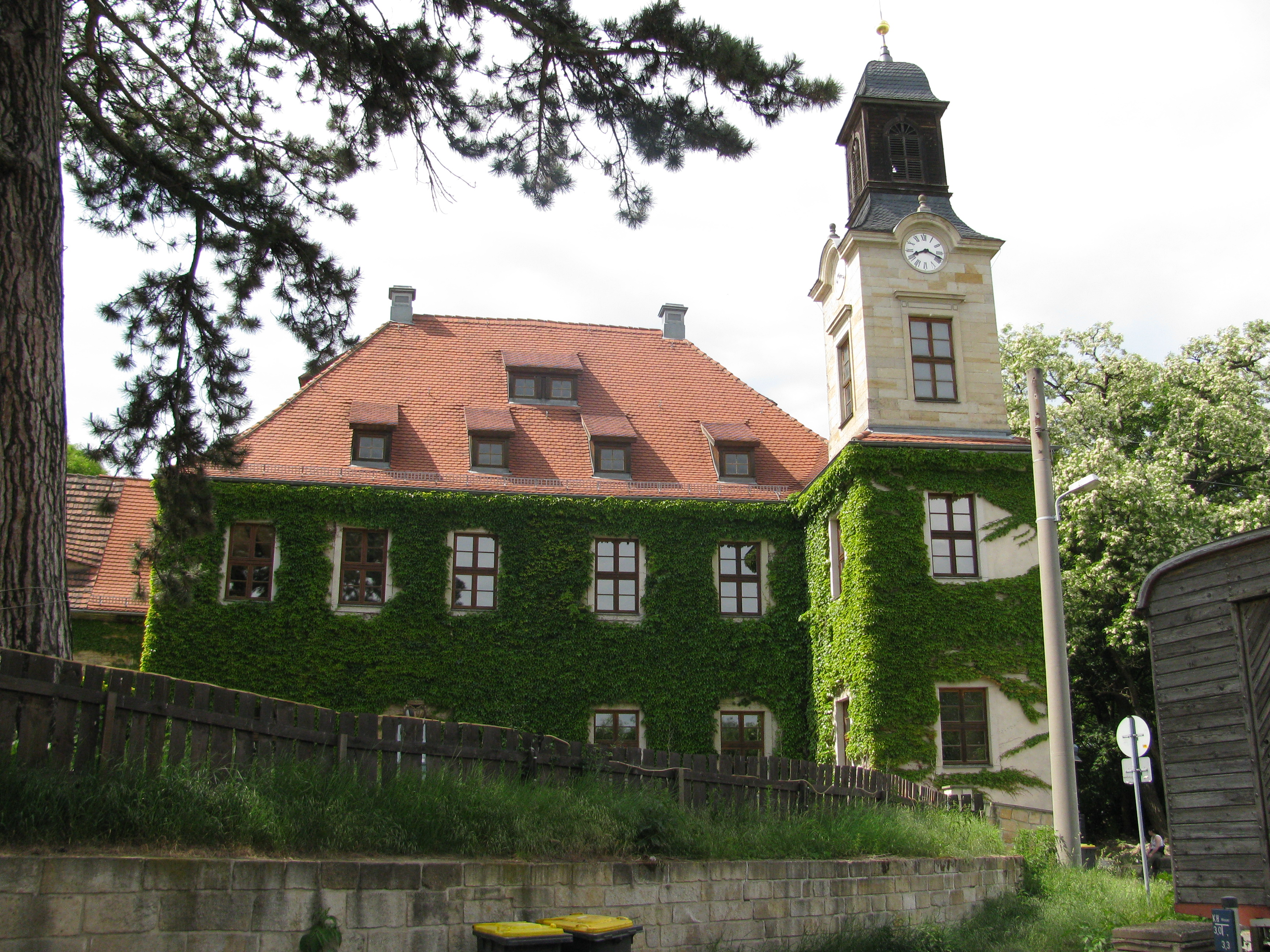 Schloss Nickern, Landeshauptstadt Dresden